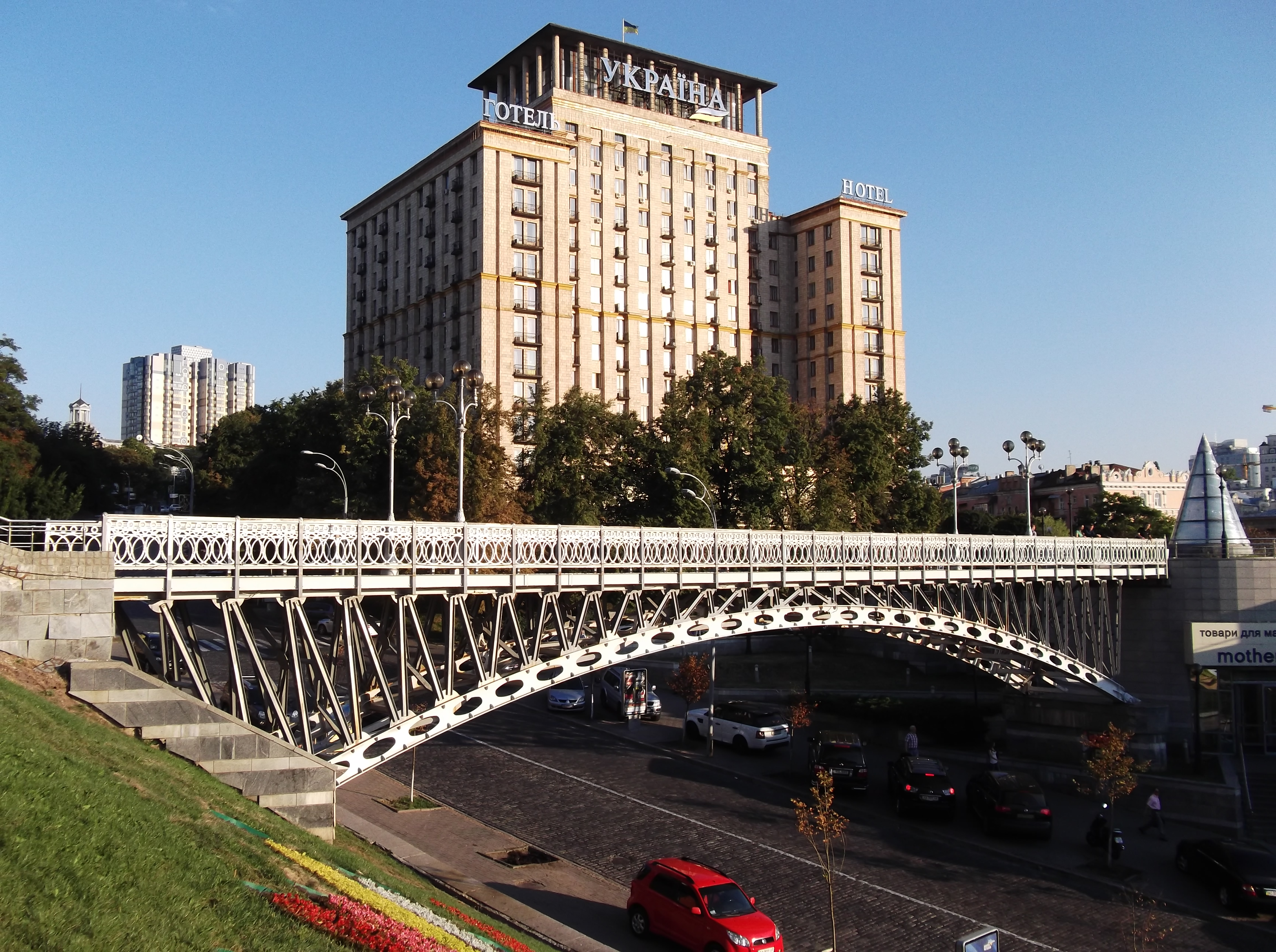 Hotel Ukraina